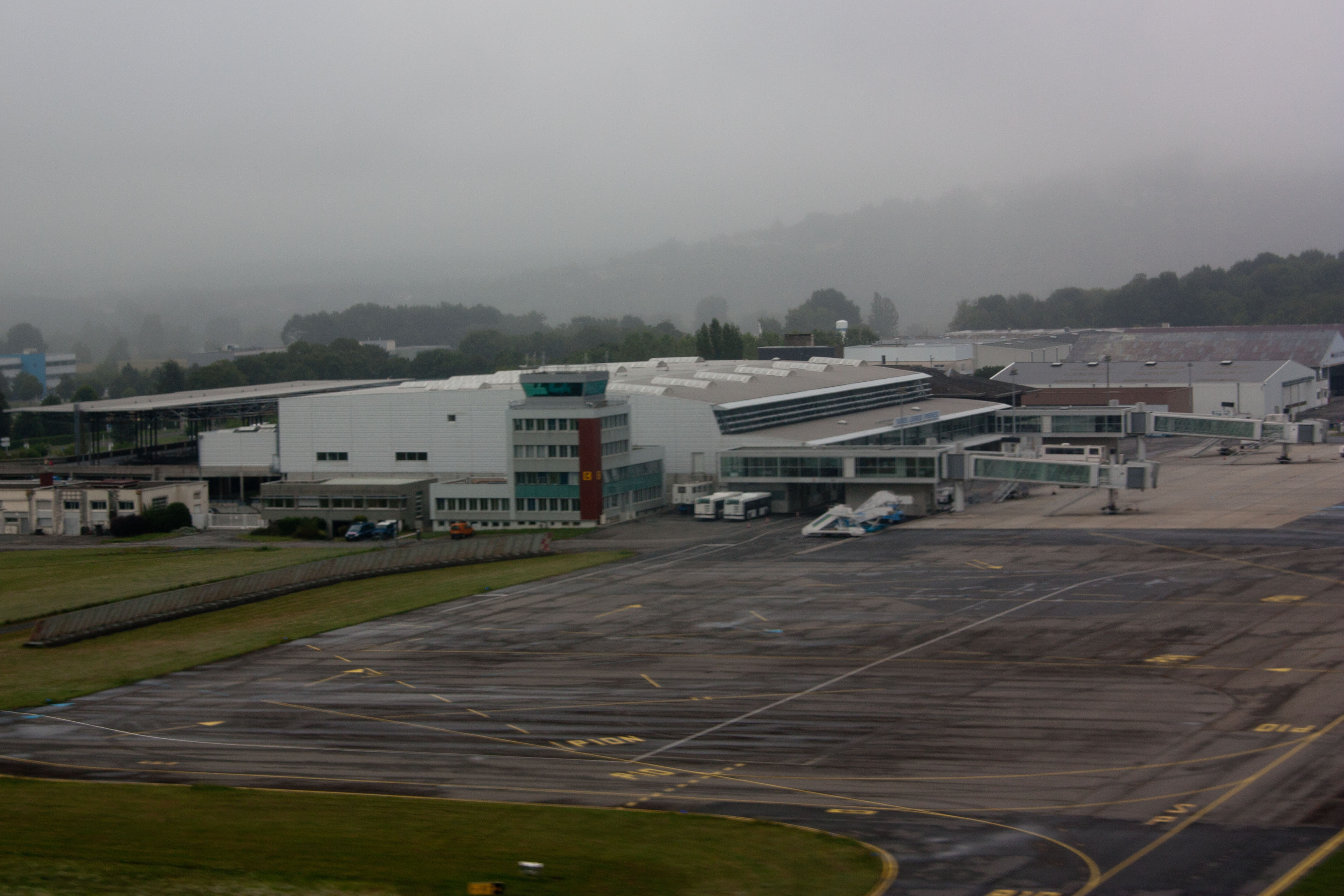 Aéroport de Tarbes-Lourdes-Pyrénées - vue de l'aérogare, du tarmac et des pistes